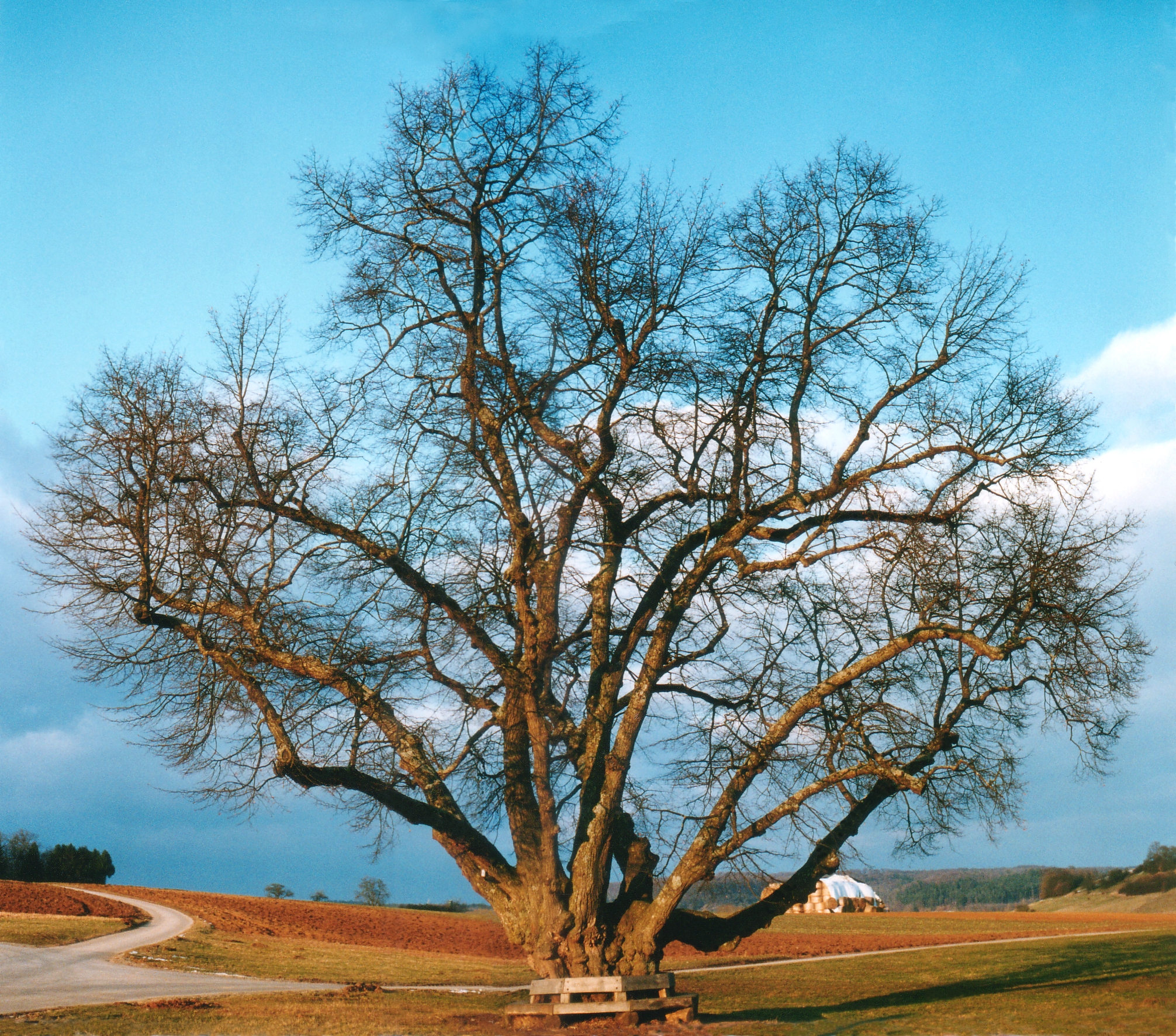 Obere Linde bei Hildrizhausen, eine als Naturdenkmal geschützte Linde (Tilia sp.) im Landkreis Böblingen, Baden-Württemberg